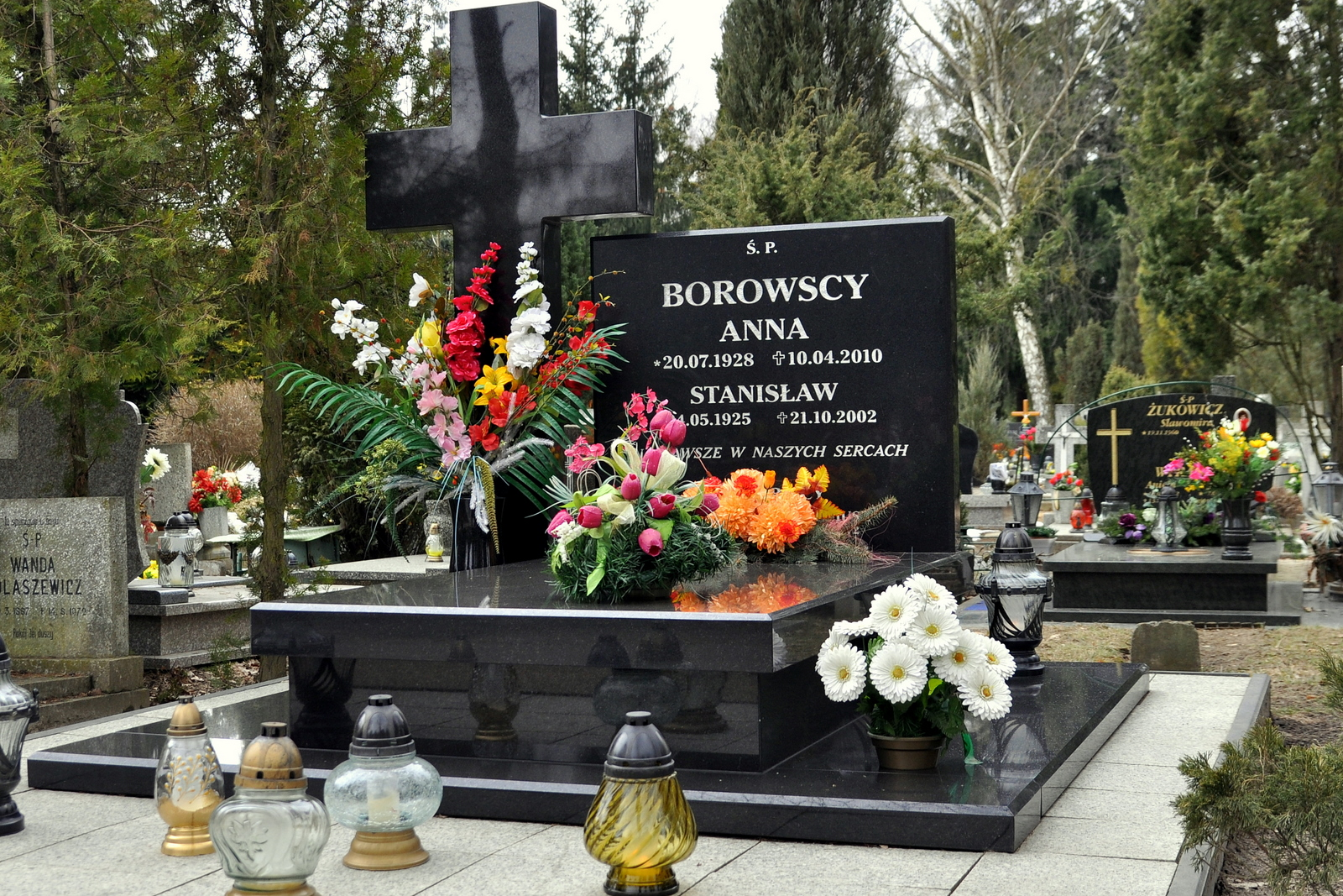 Grób Anny Borowskiej, ofiary katastrofy lotniczej w Smoleńsku 10. 04. 2010 r. Cmentarz komunalny w Gorzowie Wlkp.